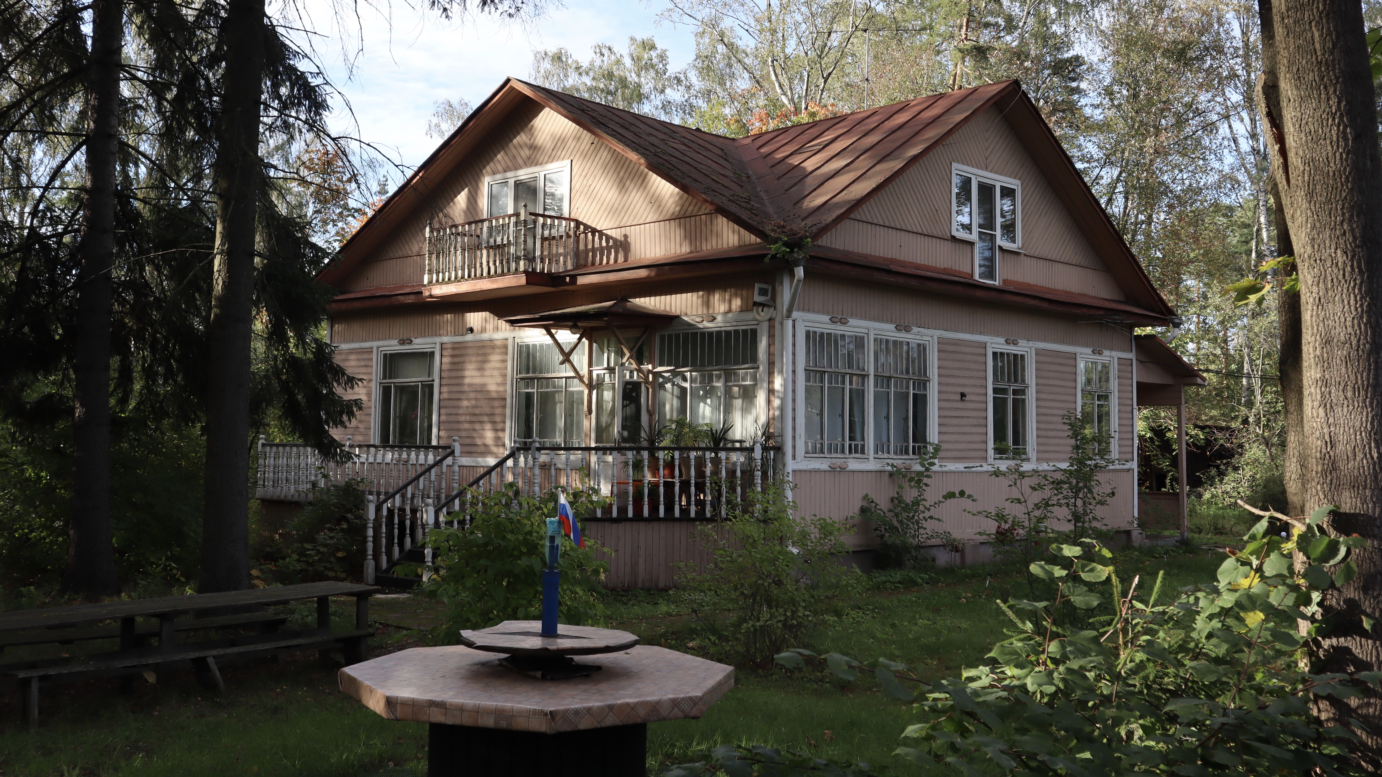 Дом, в котором в 1938-1968 годах жил артист В.К. Папазян: Вокзальная улица, 7, проспект Ленина, 2, Ольгино, Приморский район, Санкт-Петербург